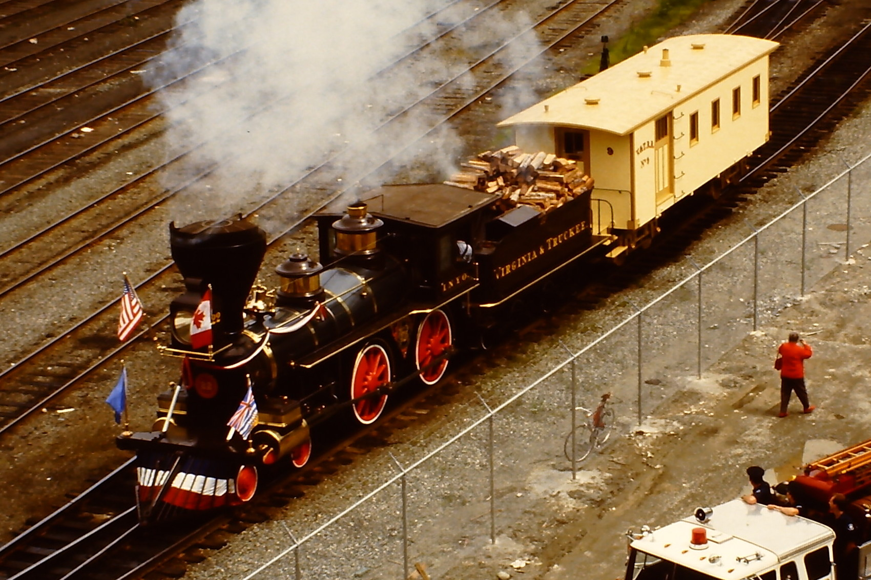 Virginia & Truckee Nummer 22 Inyo auf der SteamExpo 86